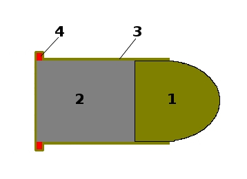 Náboj s okrajovým zápalem